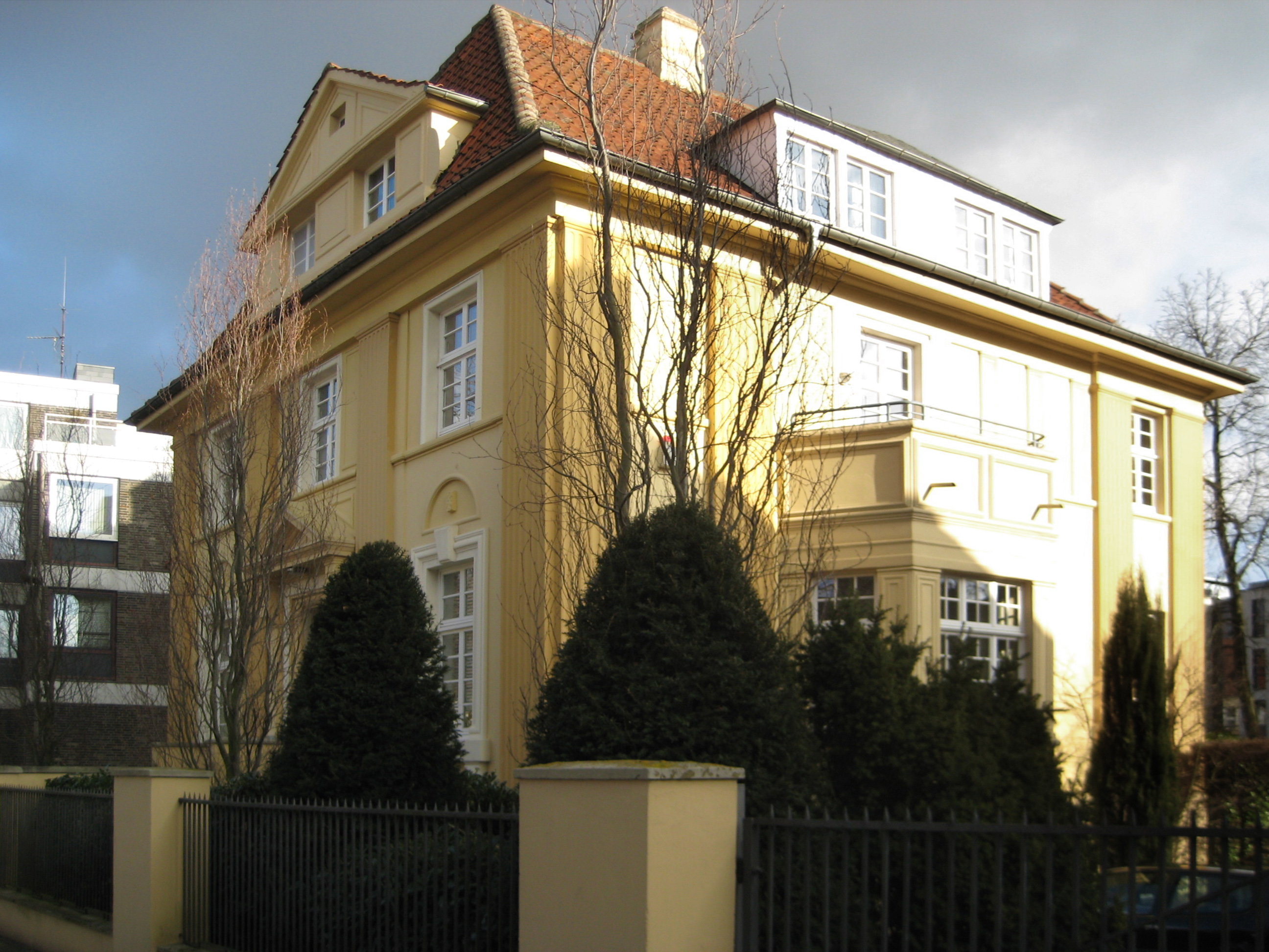 Villa Nussbaum in Osnabrück, 1922 erbaut von Rahel und Philipp Nussbaum, Eltern von Felix Nussbaum; sie wurden 1944 in Auschwitz und Stutthof ermordet. Das Atelier des jungen Felix Nussbaum befand sich im Dachgeschoss